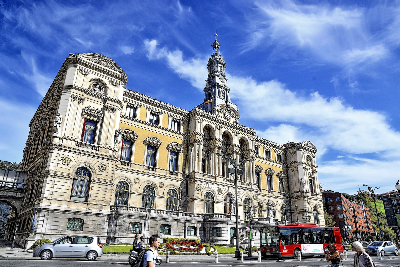 ayuntamiento de Bilbao